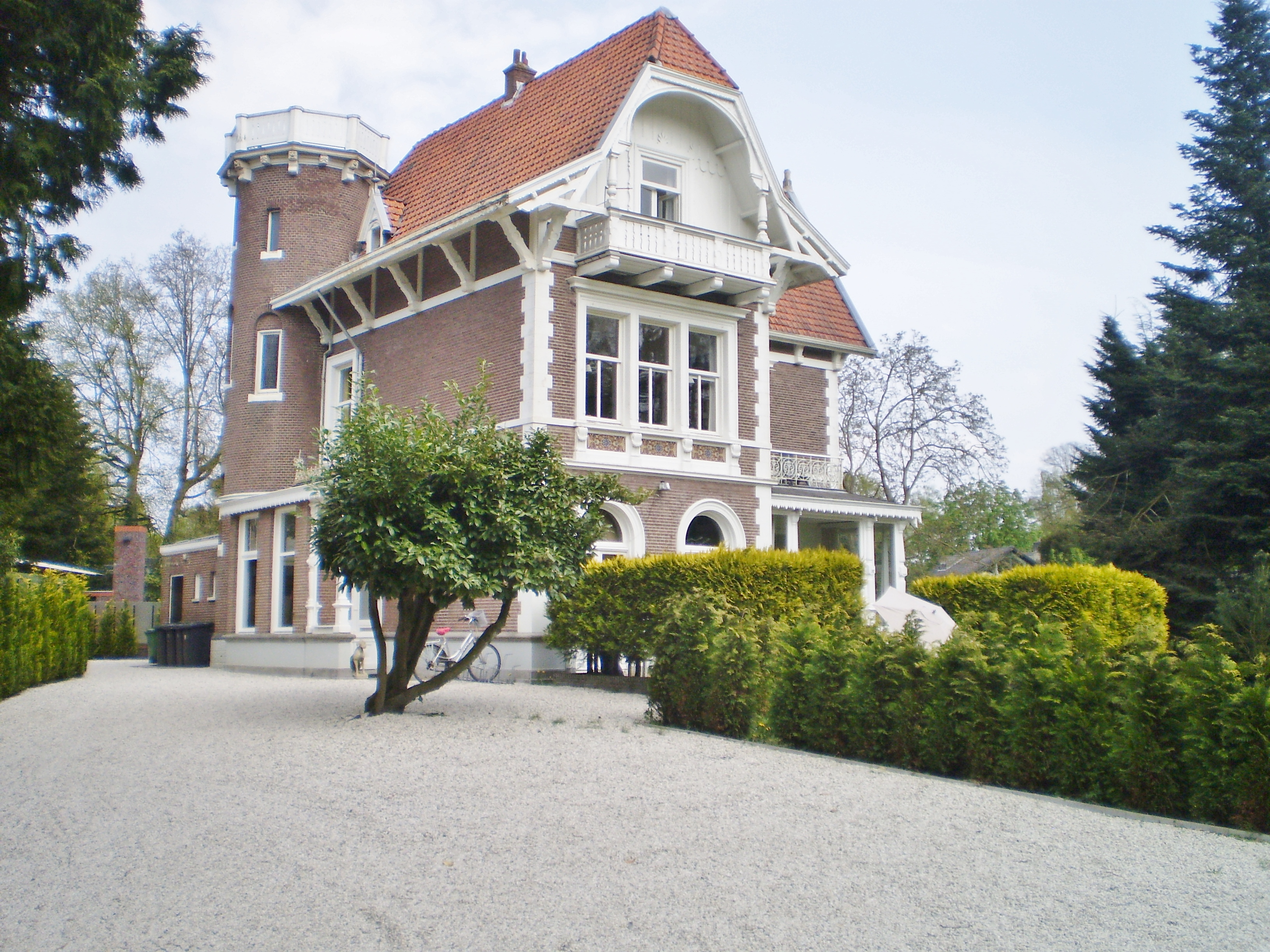 Hoog Baarn